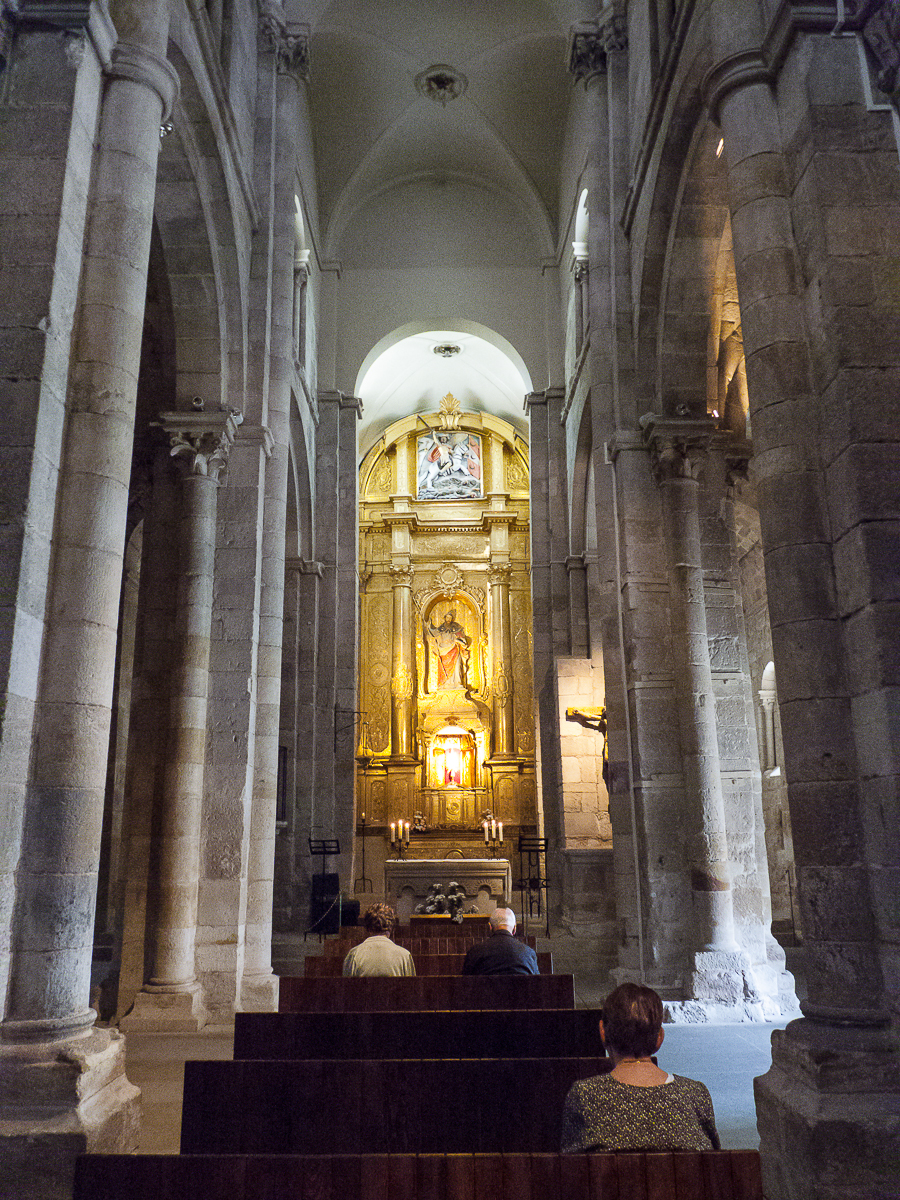 05082013 175309 ZAMORA 0002